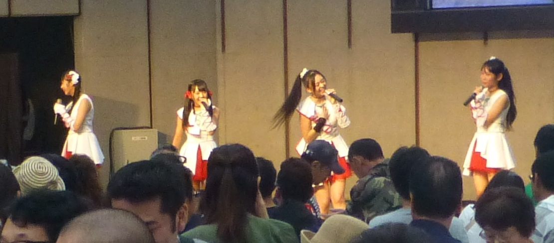 とちおとめ25（とちおとめ にじゅうご、Tochiotome25）は、2010年（平成22年）に結成された栃木県を中心に活動する女性アイドルグループである。